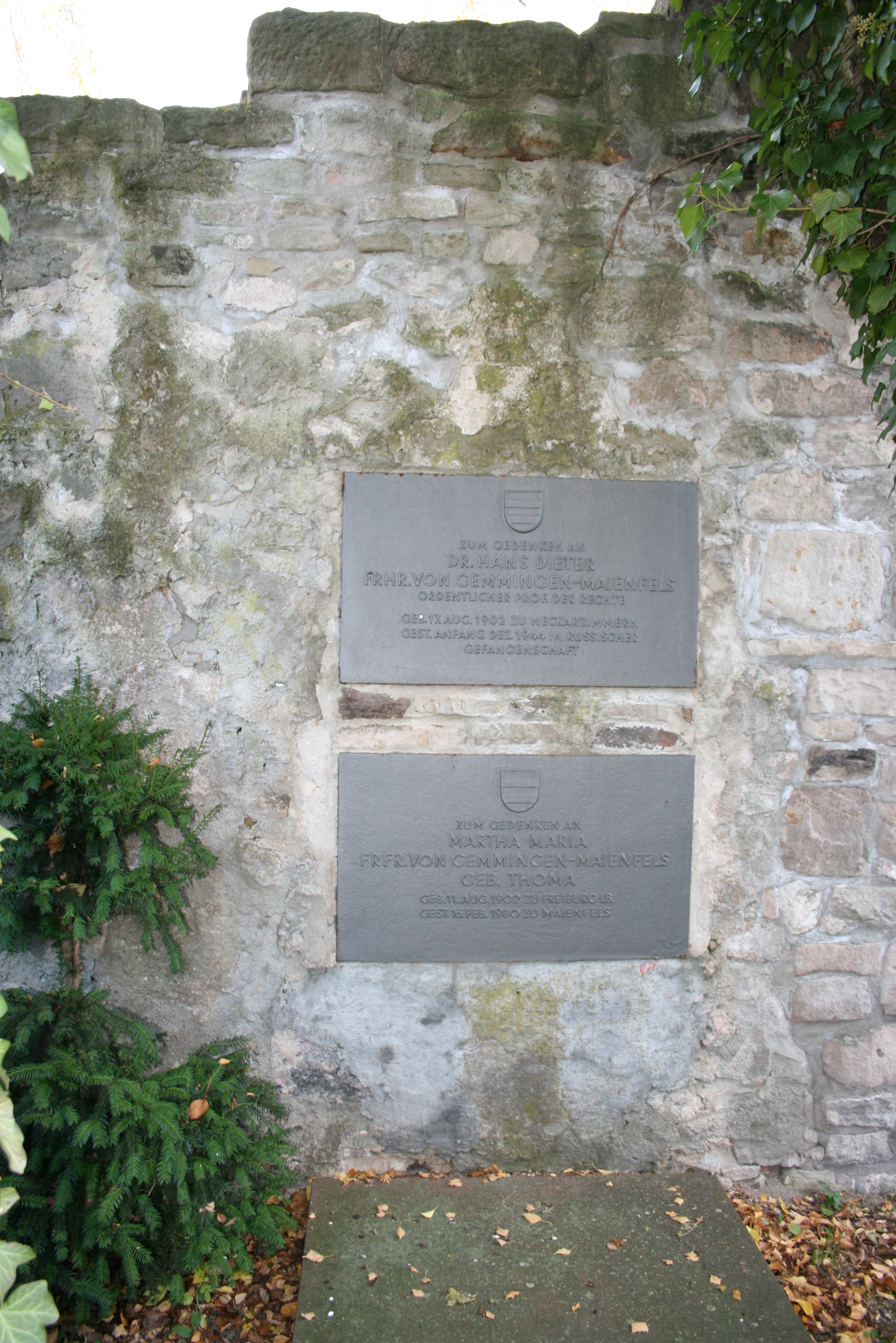 Gedenktafeln in der Burg Maienfels